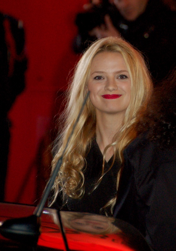 Sara Forestier, cérémonie des Césars 2008.